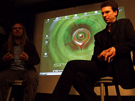 Dr. Martin Geisler (2008) Veranstaltung des Institutes für Computerspiel - Spawnpoint